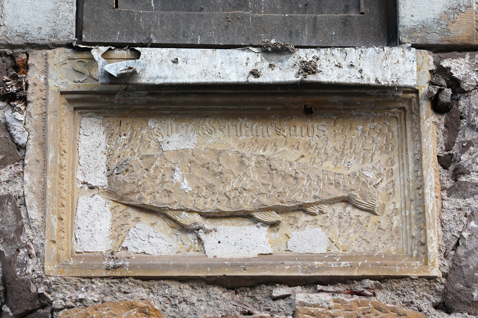 Gotha, Augustinerstraße, Amtshaus, Detail Hauszeichen "Zum Grünen Lachs", 2014